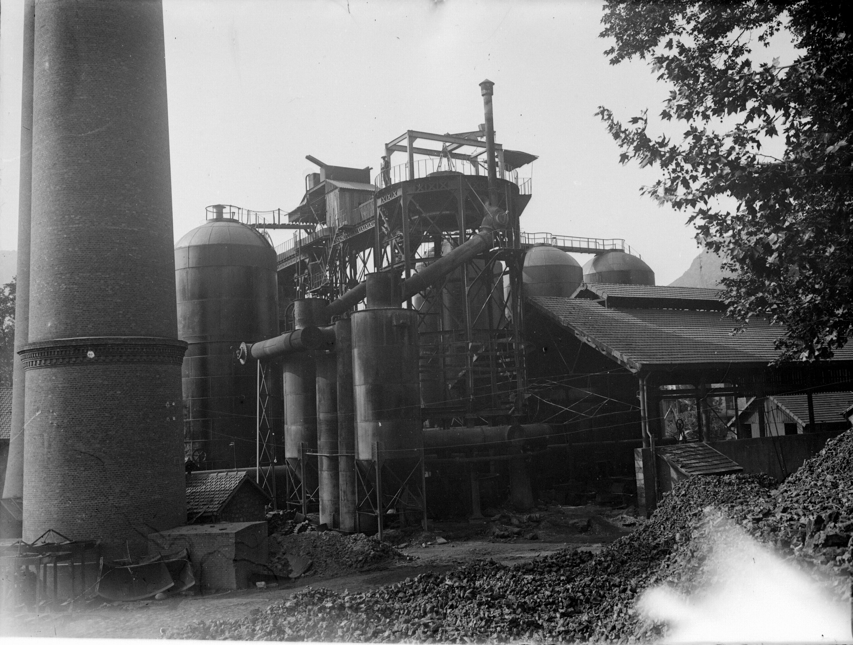 Fonds Trutat - Photographie ancienne Cote : TRU C 463 Localisation : Fonds ancien Original non communicable Titre : Tarascon : les hauts fourneaux, avril 1909 Auteur : Trutat, Eugène Rôle de l’auteur : Photographe Lieu de création : Tarascon-sur-Ariège (Ariège) Date de création : 1909 Mesures : 13 x 9 cm Mot(s)-clé(s) : -- Usine -- Fourneau -- Silo -- Tuyau -- Charbon -- Arbre -- Platane -- Ariège (Midi-Pyrénées) -- Tarascon-sur-Ariège (Ariège) -- 20e siècle, 1e quart Médium : Photographies Médium : Positifs sur plaque de verre -- Noir et blanc -- Paysages industriels Bibliothèque de Toulouse. Domaine public